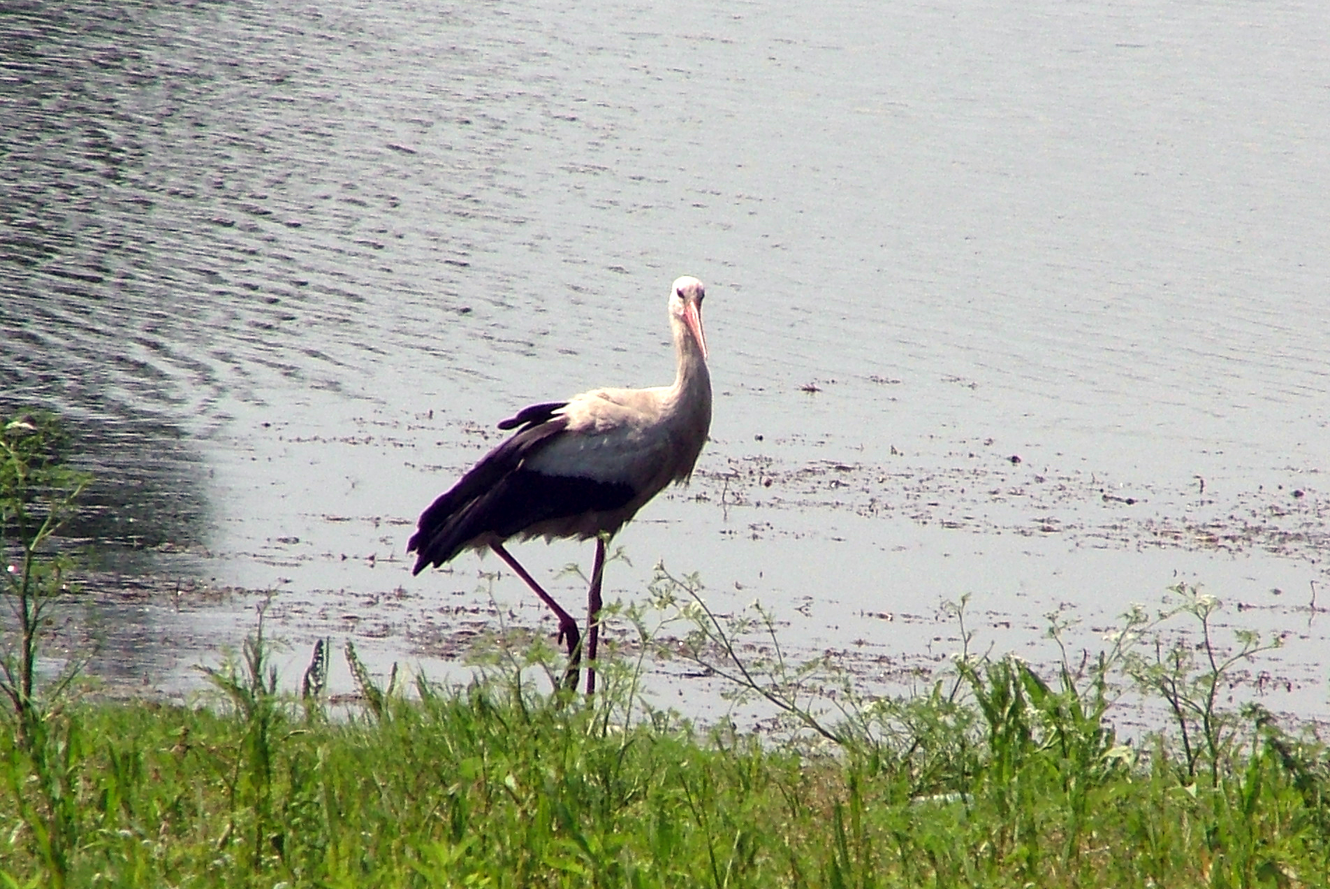 Српски (ћирилица): РС12РП28